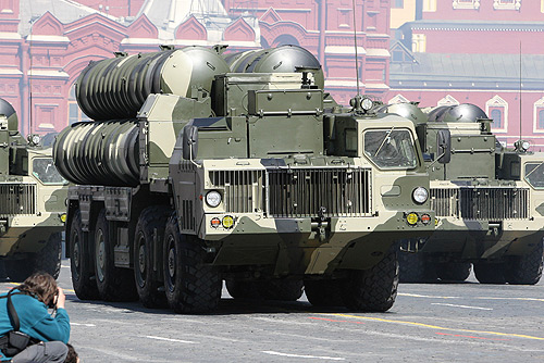 МОСКВА. Военный парад в честь 64-й годовщины Победы в Великой Отечественной войне. По Красной площади движутся зенитные ракетные системы ПВО С-300 «Фаворит».